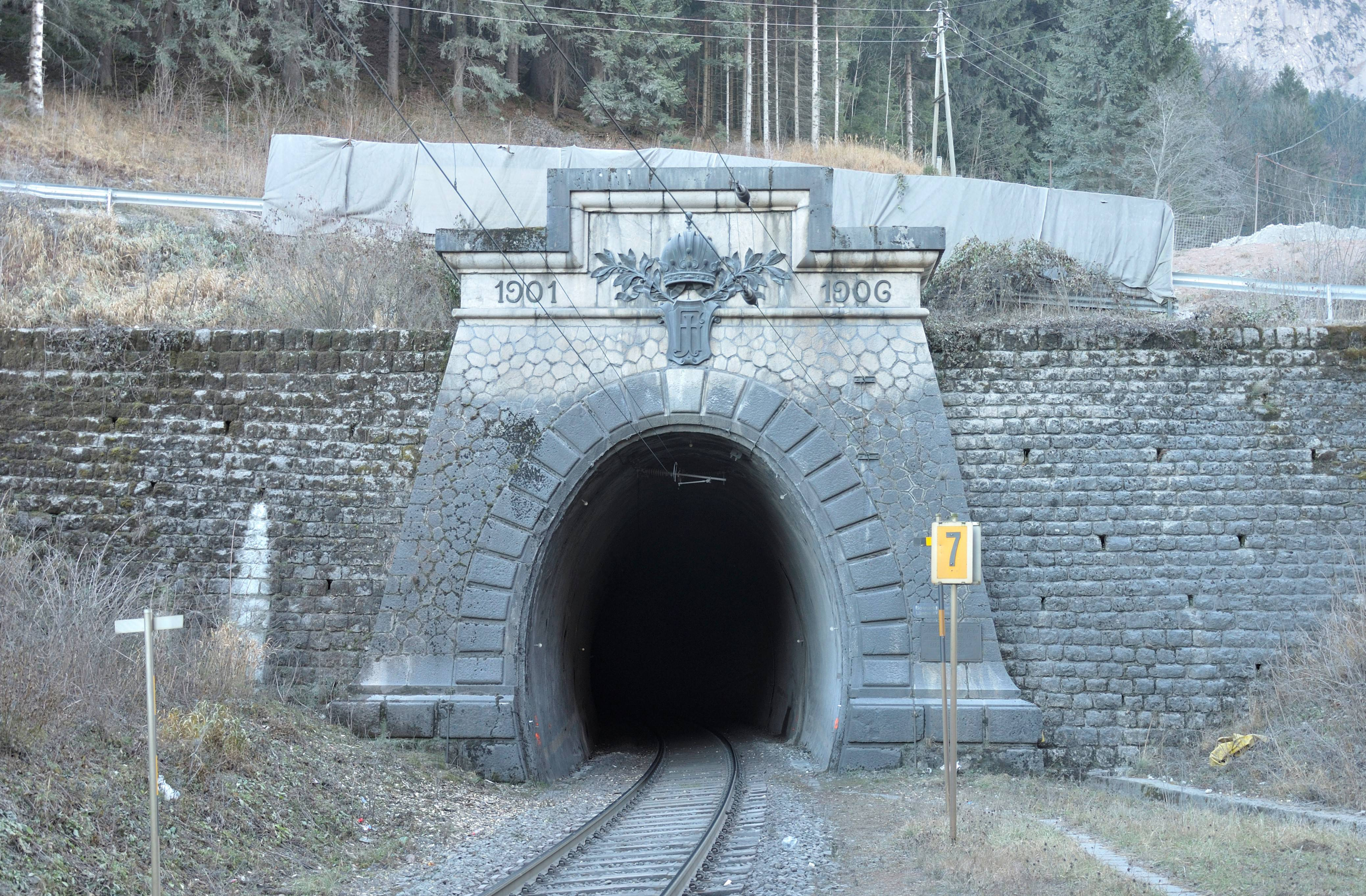 Tunnelportal Nord